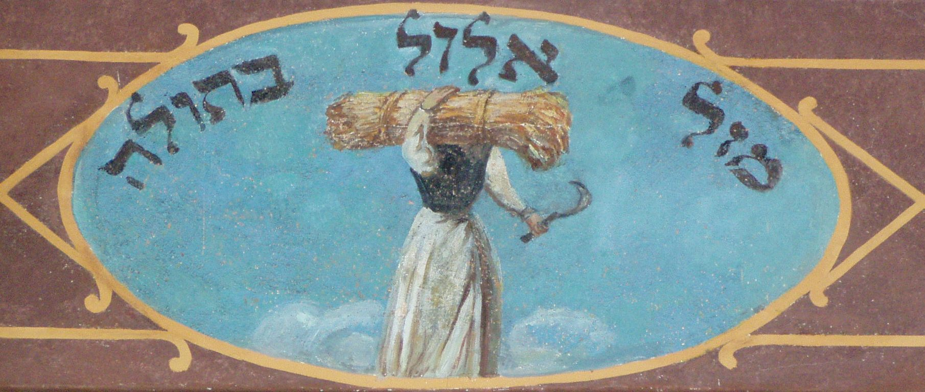 Znaki zodiaku na belkowaniu galerii dla kobiet synagogi Kupa w Krakowie